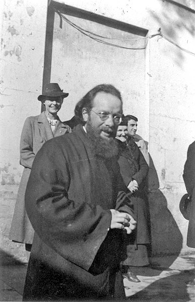 священник Димитрий Клепинин. 1932 – 1933 годы